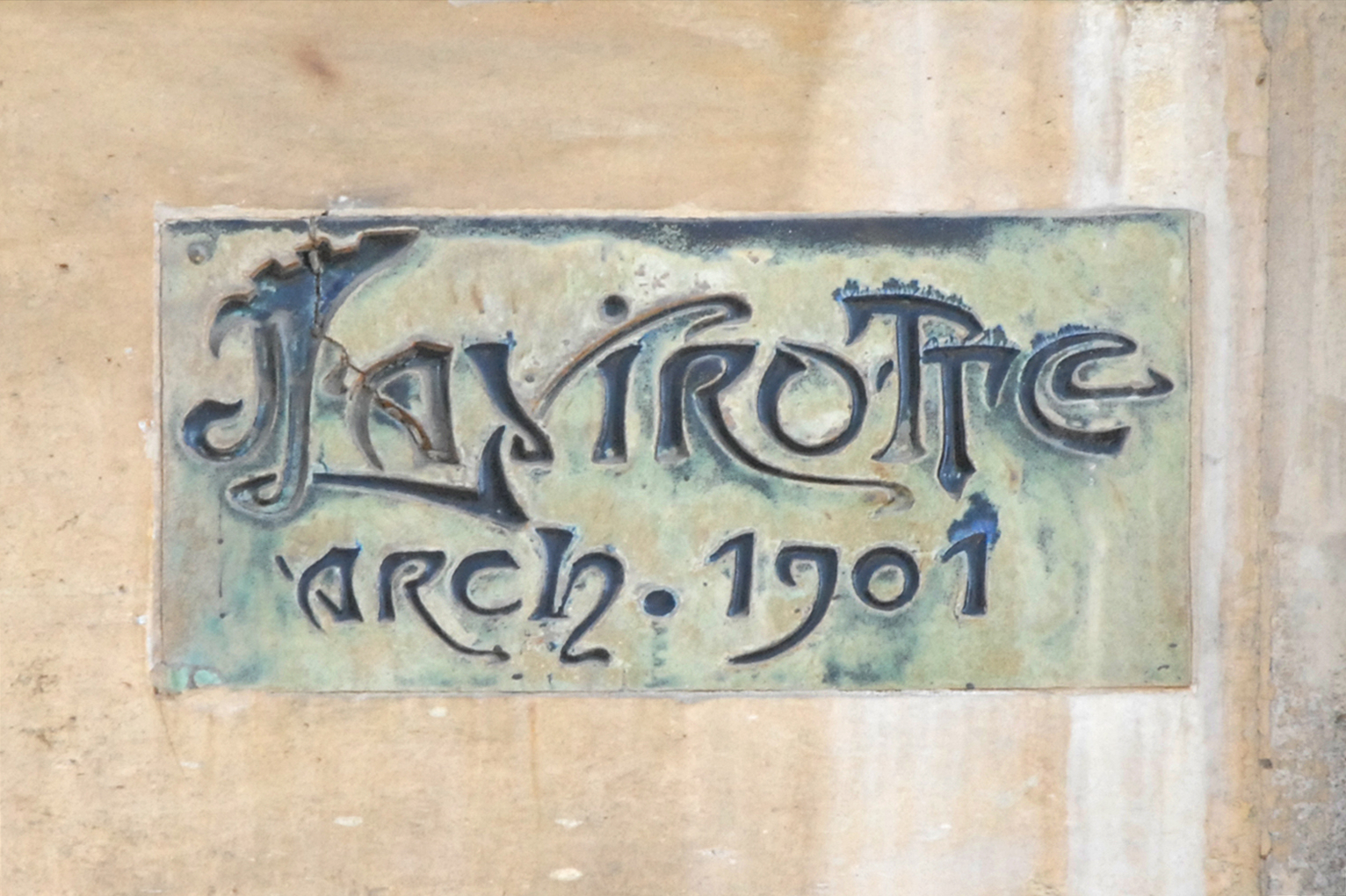 La plaque de l'architecte Jules Lavirotte Cet immeuble de style art nouveau, situé 29, avenue Rapp à Paris, a été conçu en 1900-1901 par l'architecte Jules Lavirotte. Il est considéré comme son chef d'oeuvre. Il a été primé au concours de façades de la ville de Paris de 1901 (1903 selon le panneau histoire de Paris ?). Selon certains spécialistes de l'art nouveau, il n'aurait pas appartenu à Alexandre Bigot comme l'indique le panneau sur l'histoire de Paris placé devant l'immeuble. La façade est couverte de céramiques d'Alexandre Bigot qui a travaillé avec la plupart des grands architectes de style art nouveau. Les sculptures sont de Théobald-Joseph Sporrer, Firmin Michelet, Alfred Jean Halou et Jean-François Larrivé La façade sur rue et la toiture sont inscrites monument historique par arrêté du 16 octobre 1964